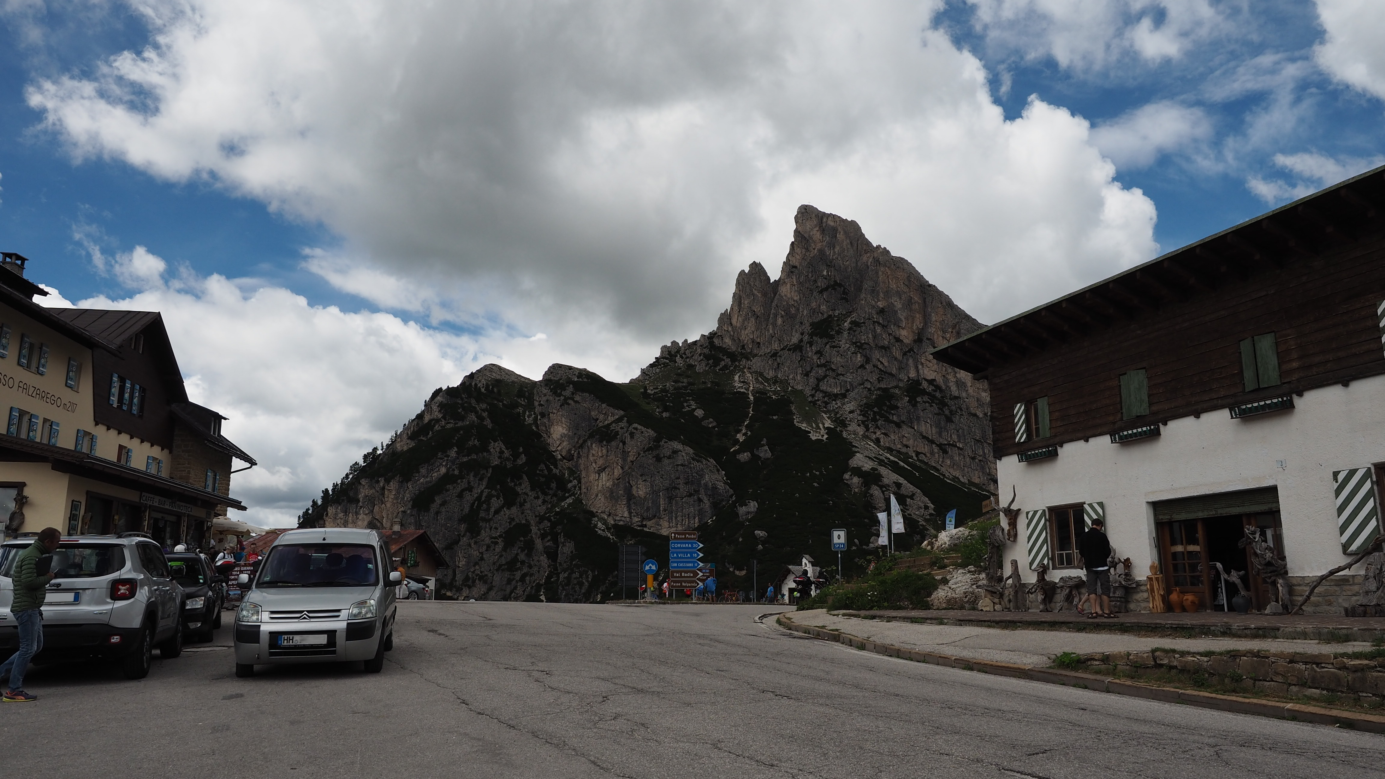 ファルツァレゴ峠から西方の眺め。正面はサッス・デ・ストリア(Sass de Stria, 2477 m)。